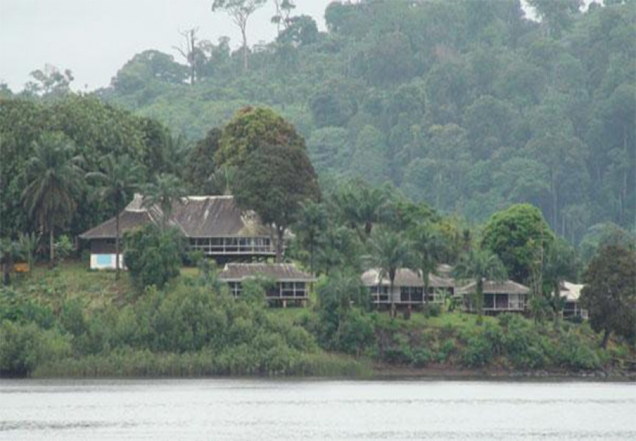 Ile de Mayumba